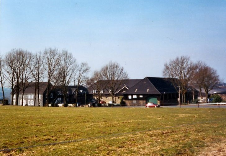 Gut Luchtenberg